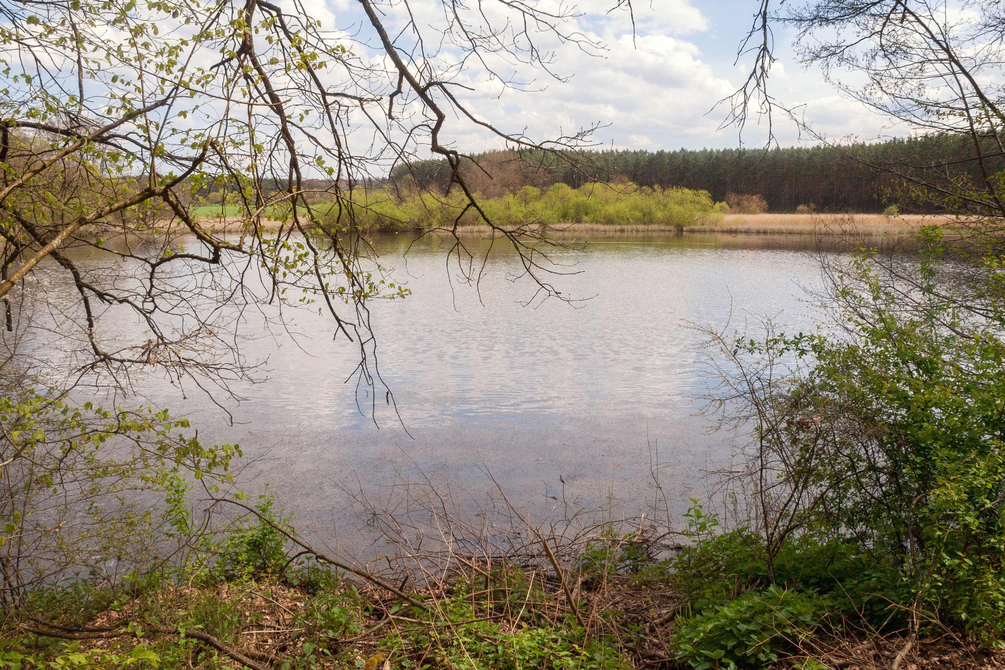 Stockweiher; Oberhembach, Pyrbaum, FFH-Gebiet Feuchtbiotope bei Oberhembach